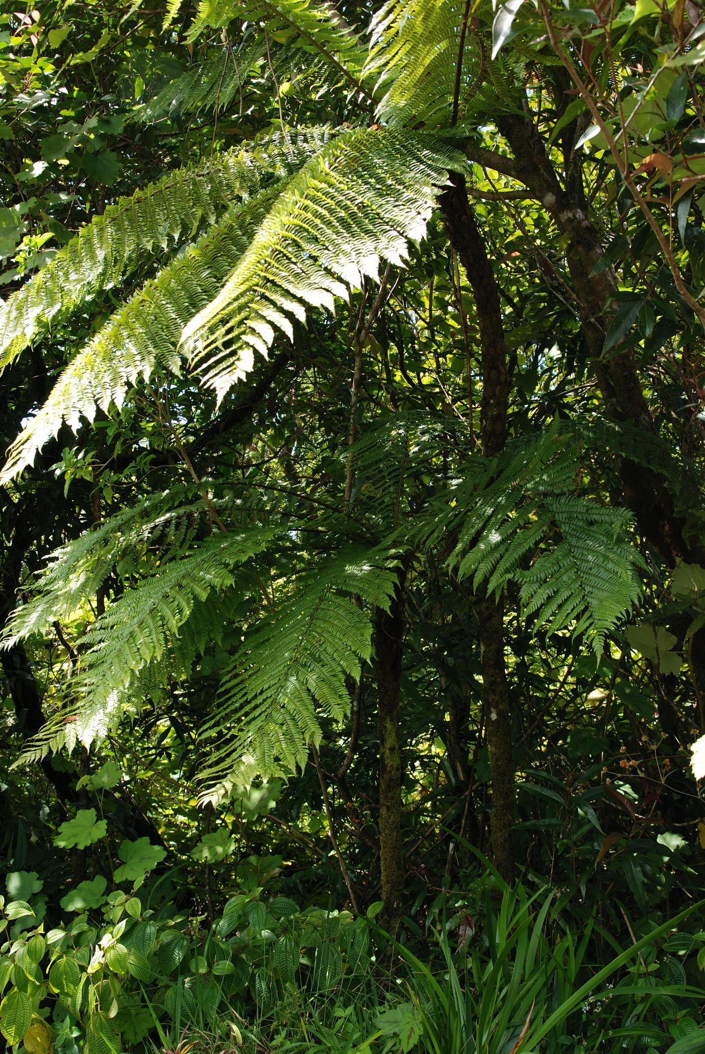 Le Fanjan male (Cyathea borbonica) est une espece indigène à la Réunion. On le trouve aussi à Madagascar et à l'ile Maurice. Il se distingue des fanjans femelles par son tronc maigre, ses feuilles bipennées, l'absence de petiole (tige nue à la base de la fronde), la forme en plume des frondes (en triangle chez les Fanjans Femelles)